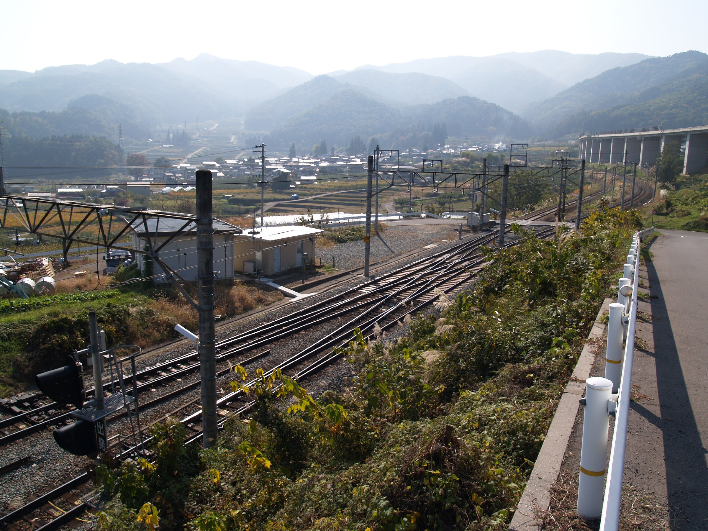 桑ノ原信号場